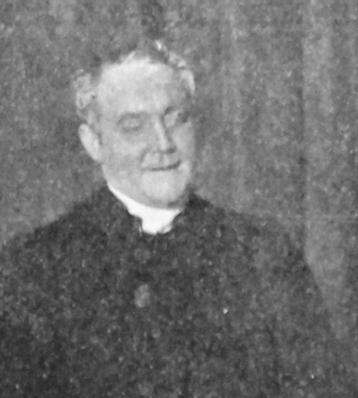 Langdon Mitchells Äktenskapskarusellen (The New Marriage) på Vasateatern i Stockholm 1918. Hugo Tranberg som pastor Matthew Phillimore.